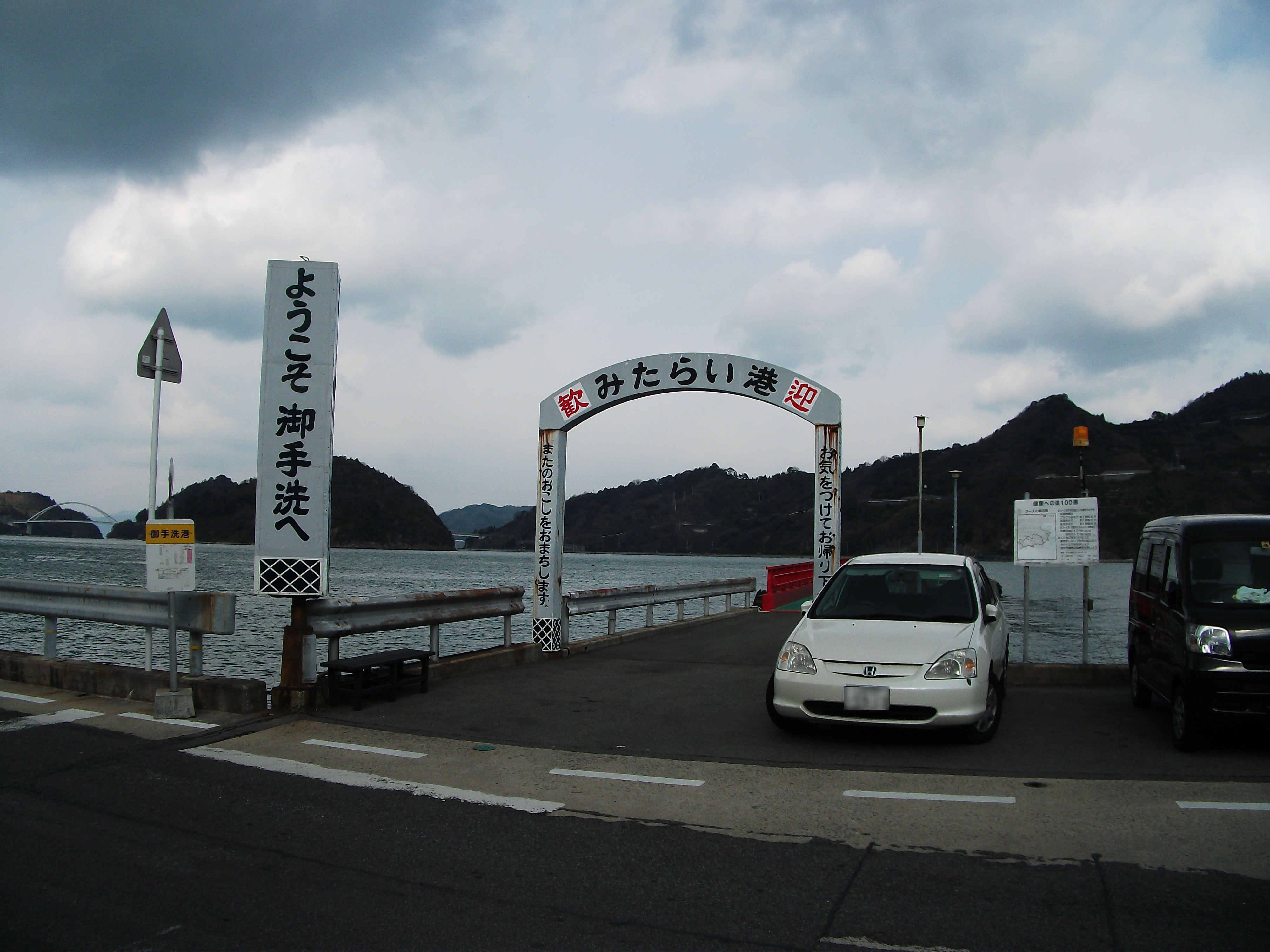 広島県呉市、御手洗港